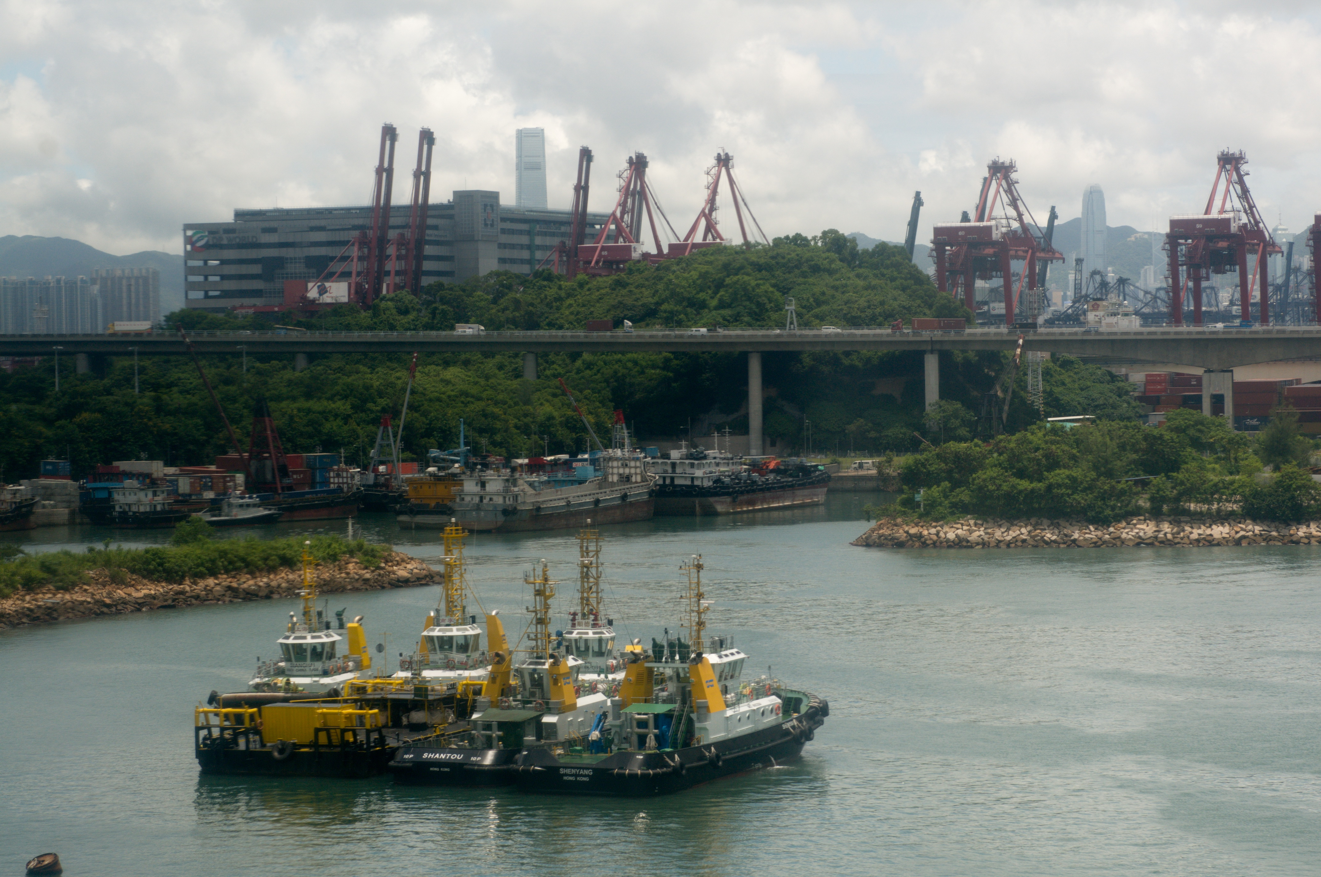 Hongkong